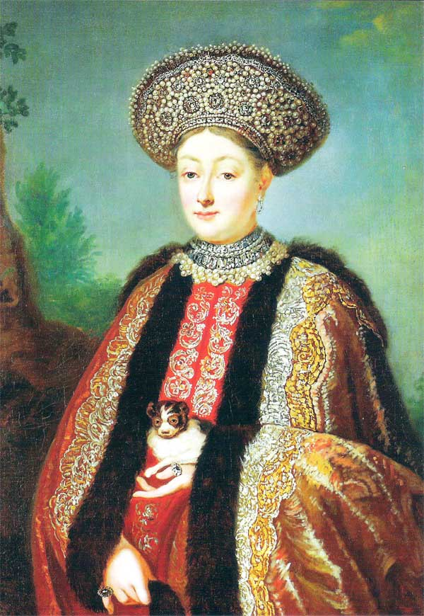 Marfa Apraxina Неизвестный художник Портрет царицы Марфы Матвеевны, урожд. Апраксиной (1664 – 1715), второй жены царя Федора Алексеевича XVIII в. (?) Холст, масло ГМЗ "Гатчина"